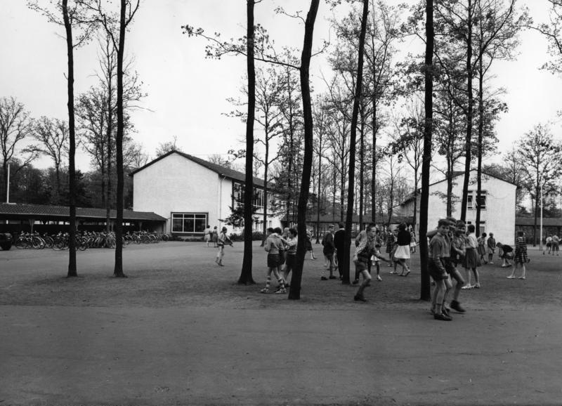 Vertriebenenstadt Espelkamp in Westfalen Schulhof des Göderblomgymnasiums Evang. Gymnasium in Aufbauform mit Förderklassen für Sowjetzonen-Flüchtlinge